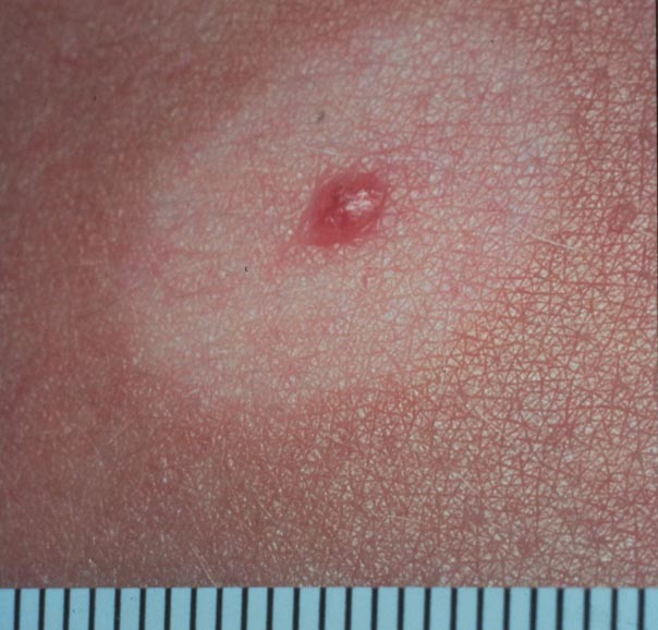 Halo nevus